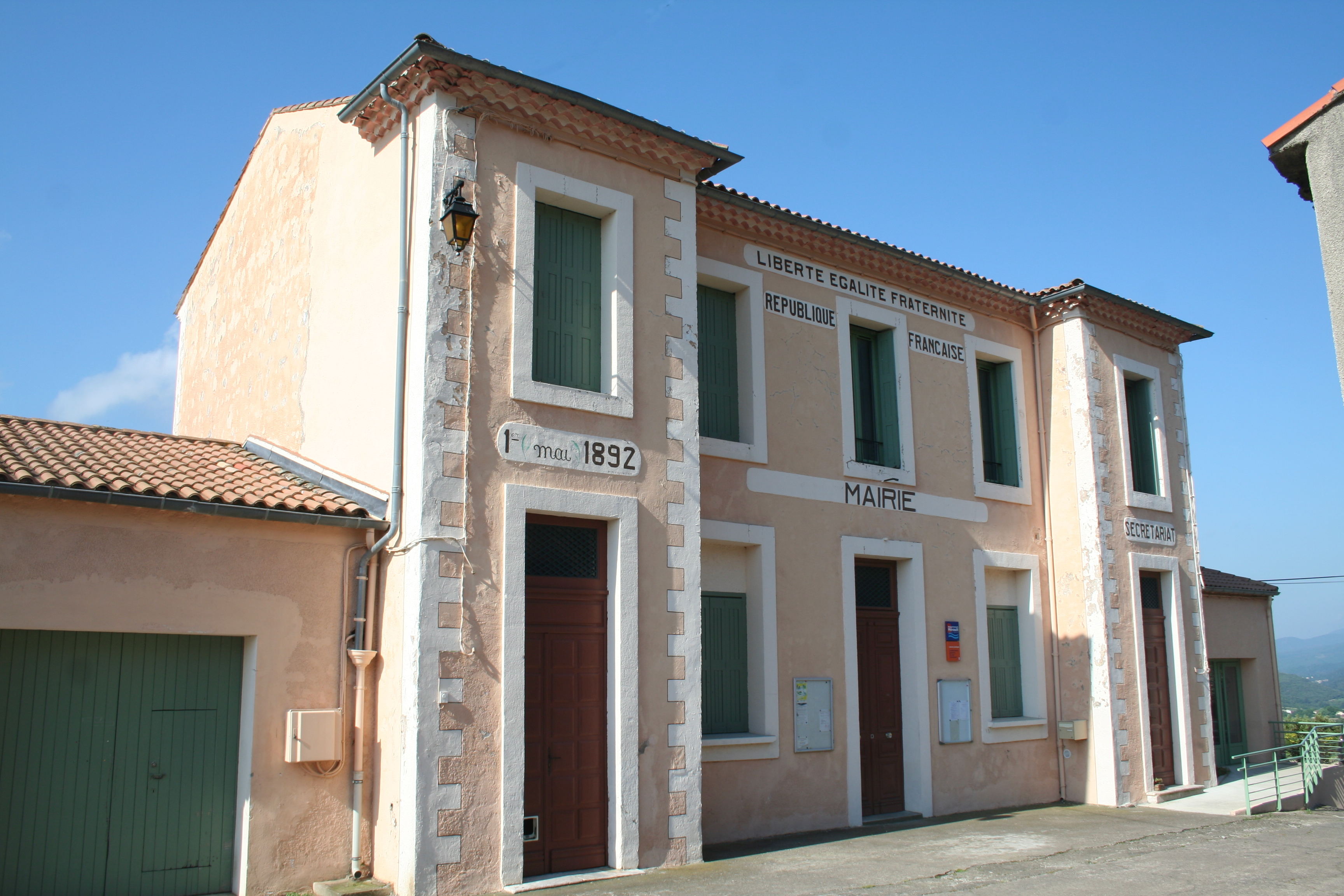 Saint-Martin-de-Larçon (Hérault) - mairie.